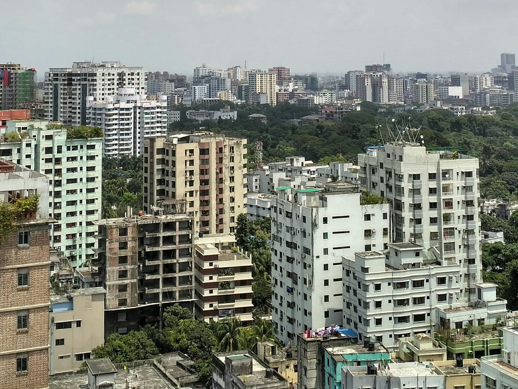 View of skyscrapers in Dhaka, Eskatan, 2018.